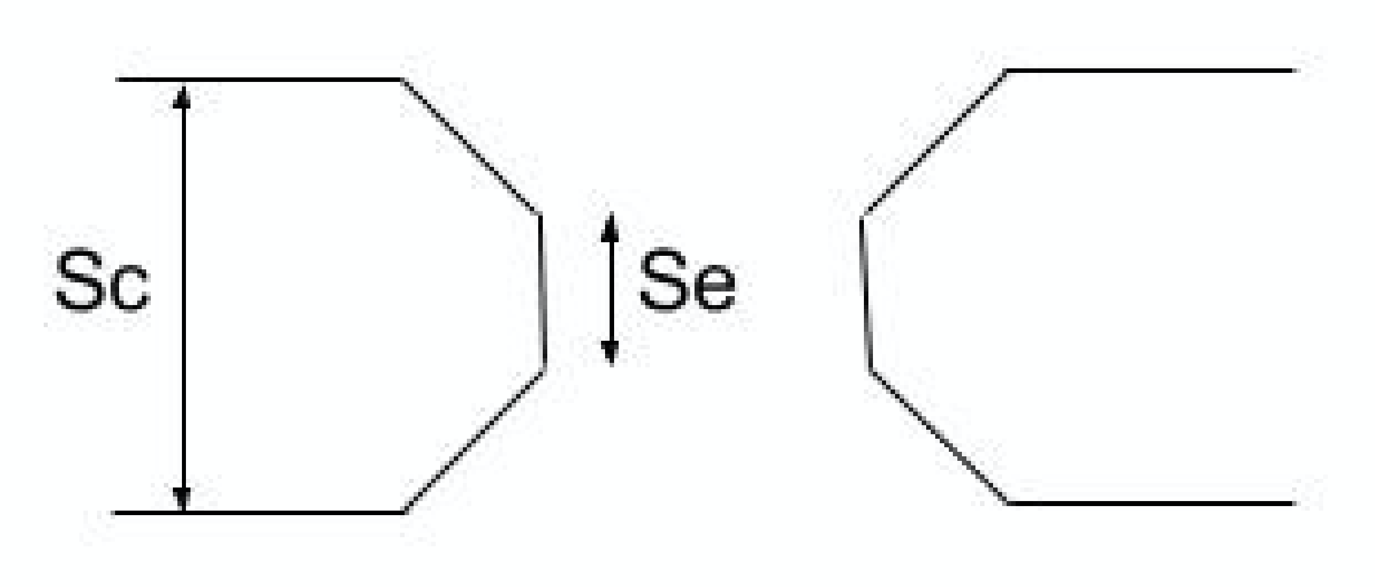 Schéma des différentes sections dans un électro-aimant à section différente à l'entrefer